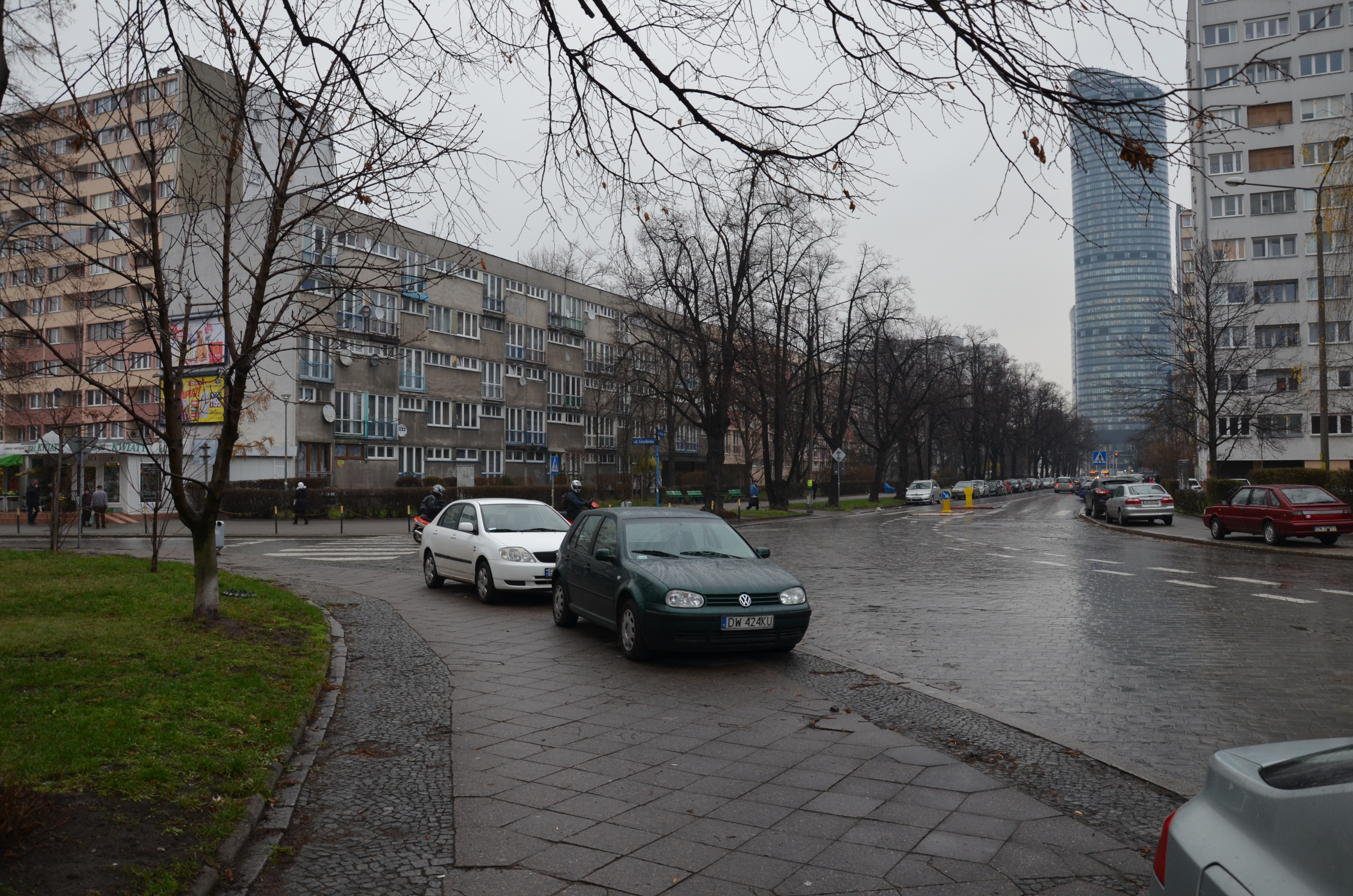 Widok w kierunku wschodnim